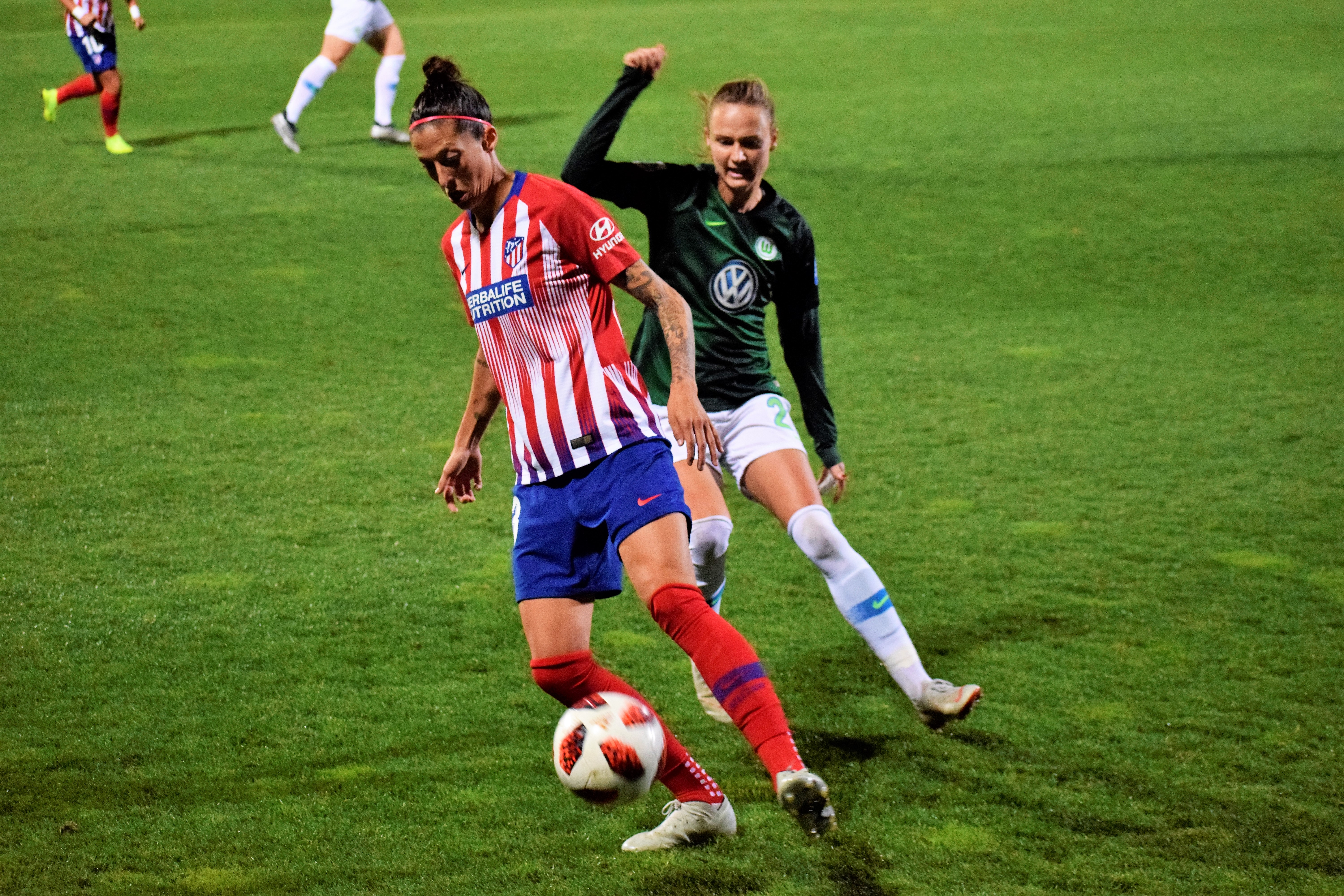 Jenni Hermoso jugando con el Atlético de Madrid ante el Wolfsburgo